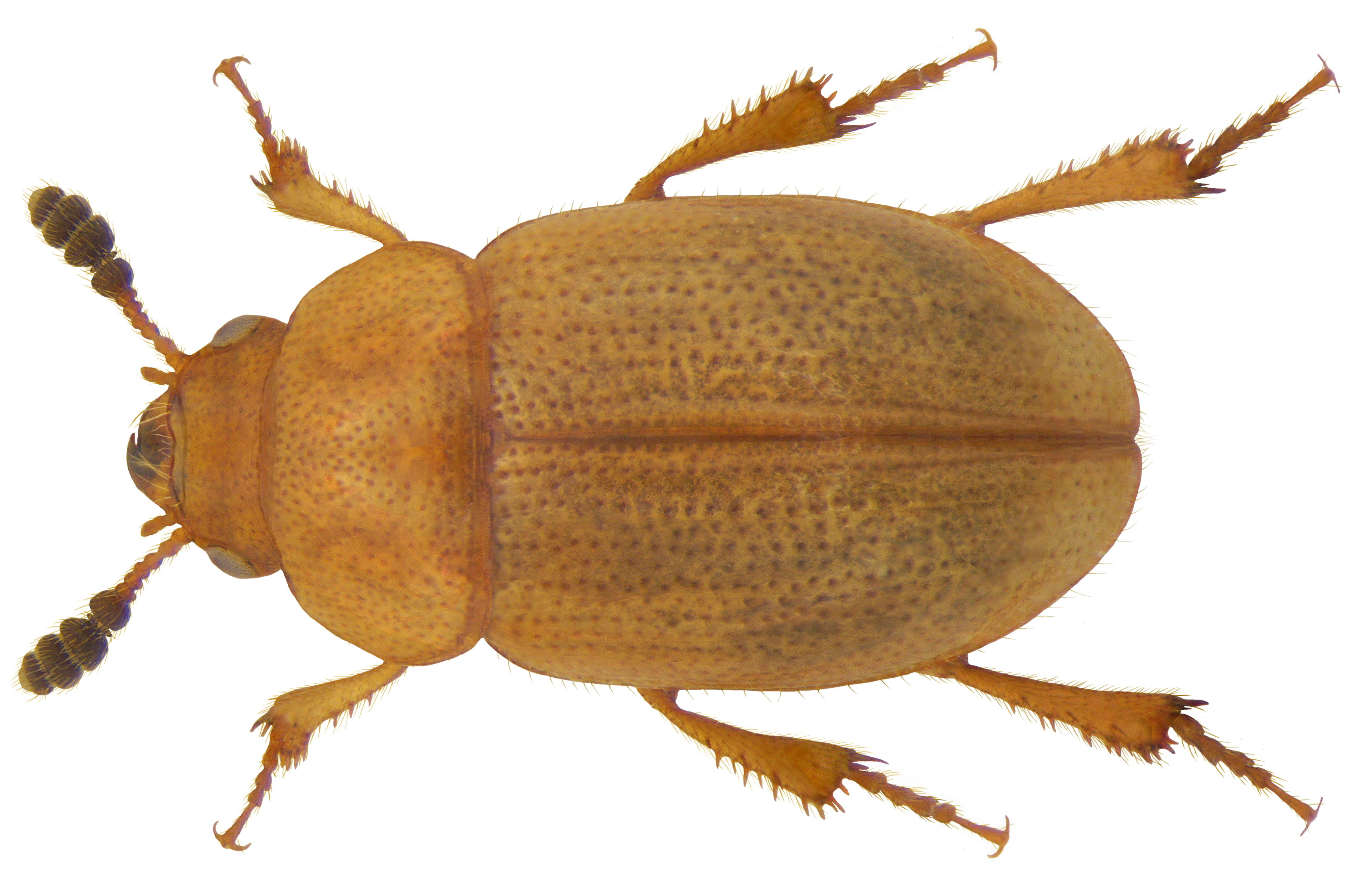 Familie: Leiodidae Groesse: 3,28 mm Verbreitung: Nord-Europa, Nord-England, Holland, Süd-Frankreich, Schweiz, Nordwest-Italien Ökologie: an unterirdischen Pilzen Fundort: England, Durham leg.det. J.Cooter, 1995 Photo: U.Schmidt, 2009